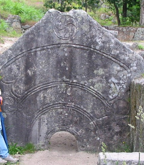 Citania de Briteiros, Portugal. Pedra Formosa in situ del balneario suroeste.